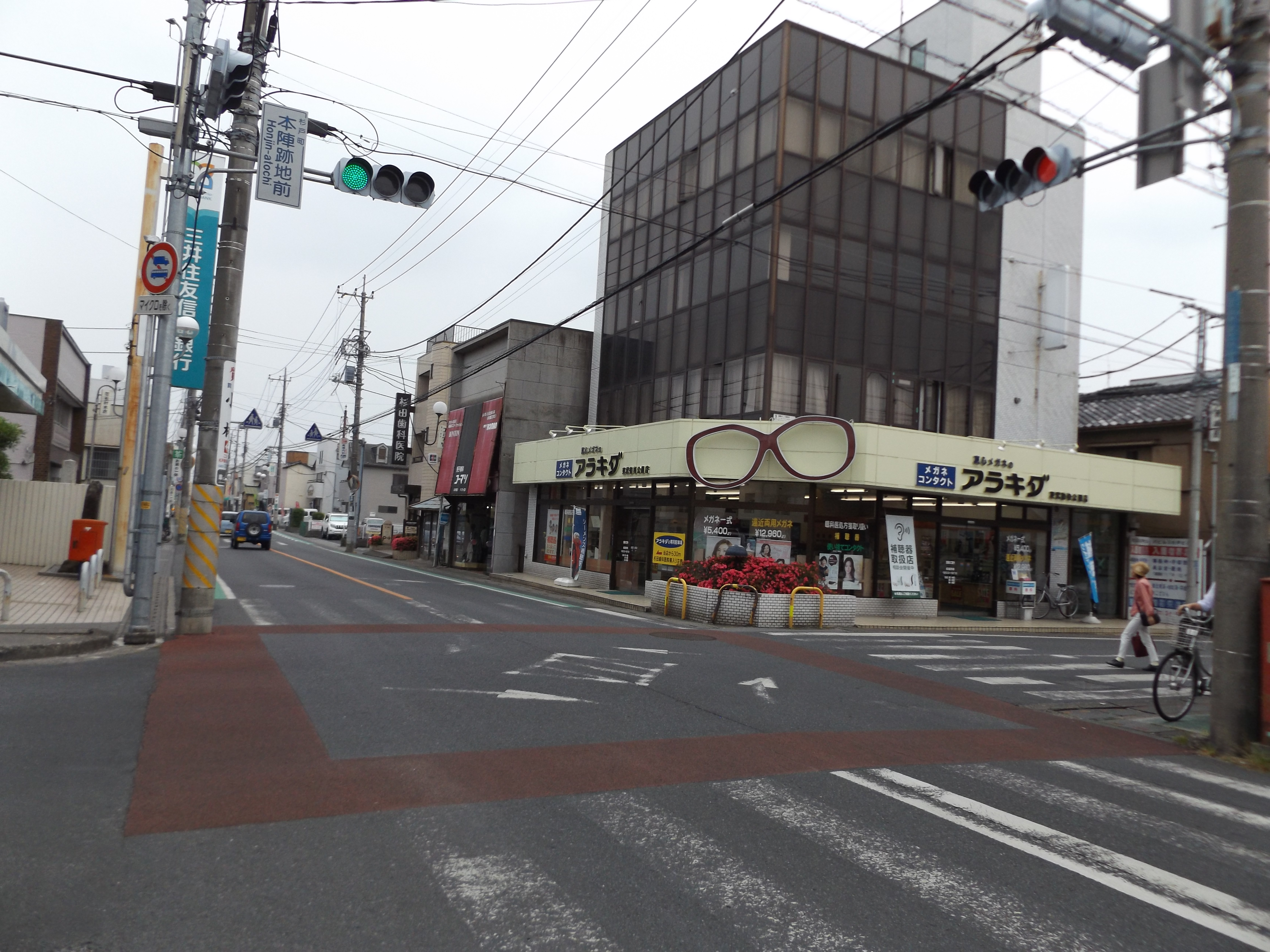 埼玉県南北葛飾郡杉戸町にある本陣跡地前交差点。 埼玉県道373号堤根杉戸線と埼玉県道408号東武動物公園停車場線の交点で、373号はここが終点である。